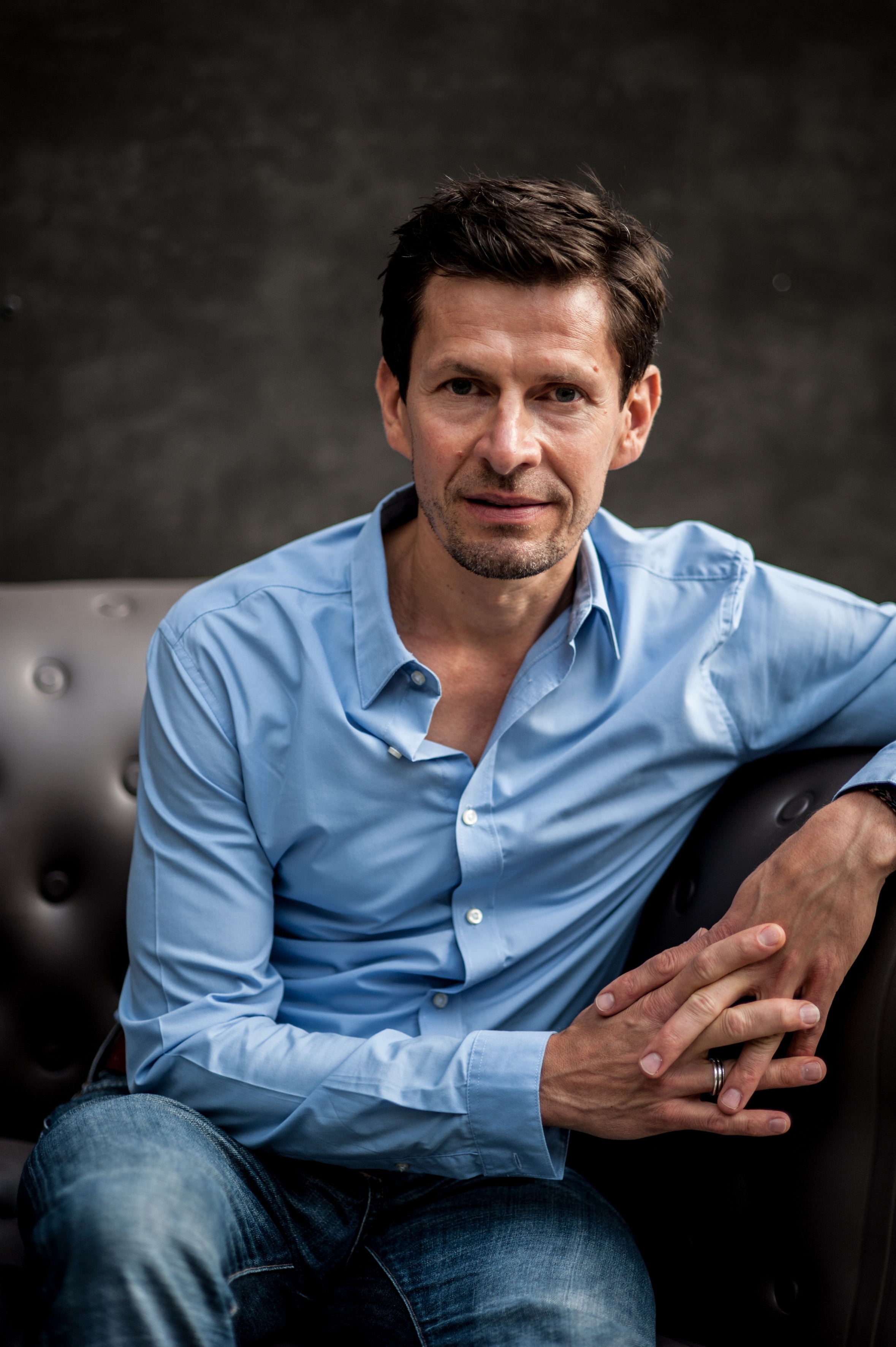 Portrait